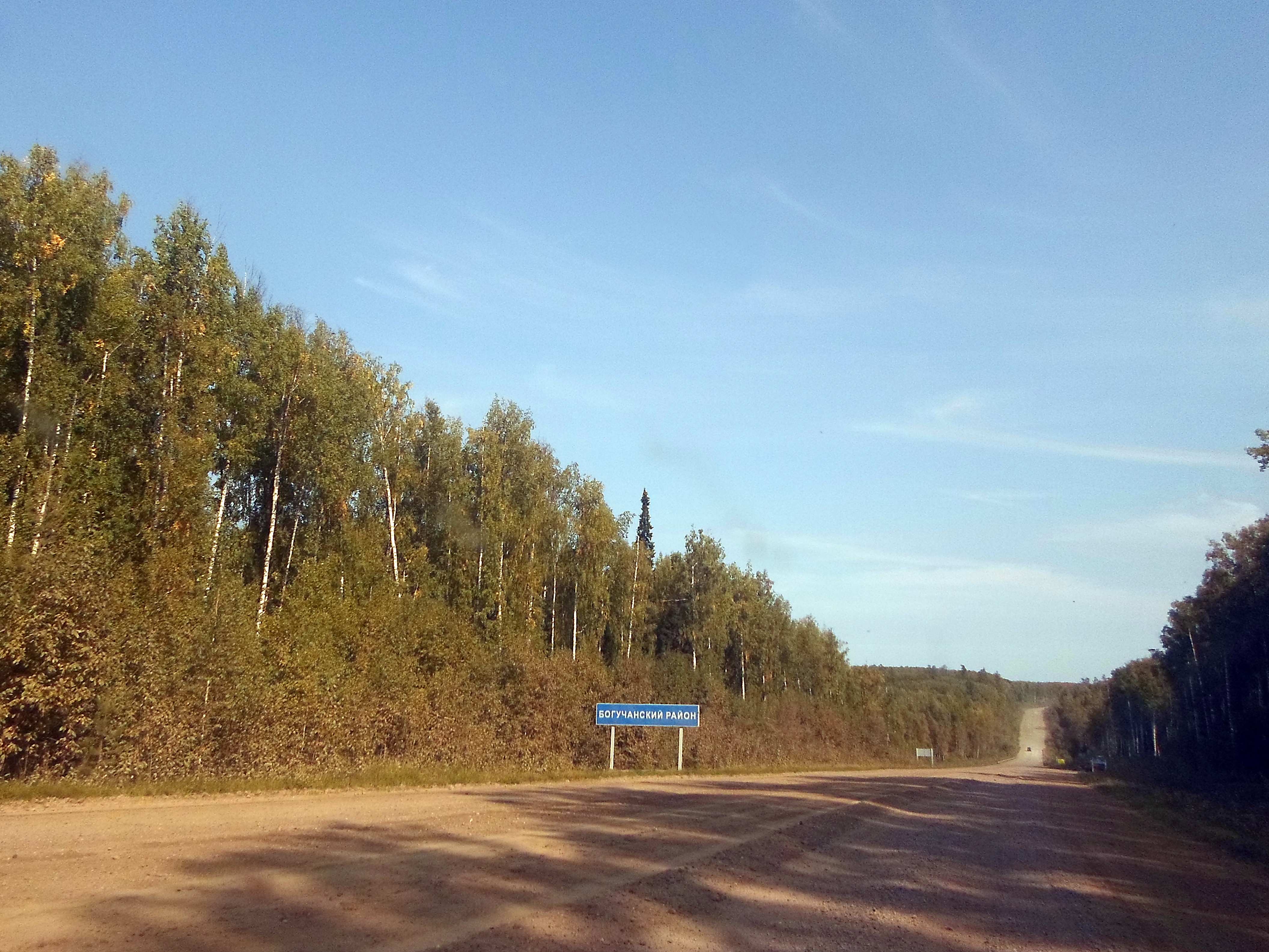 Въезд в Богучанский район со стороны Канска из Абанского района. Красноярский край. Автодорога Канск - Абан - Богучаны - Кодинск.